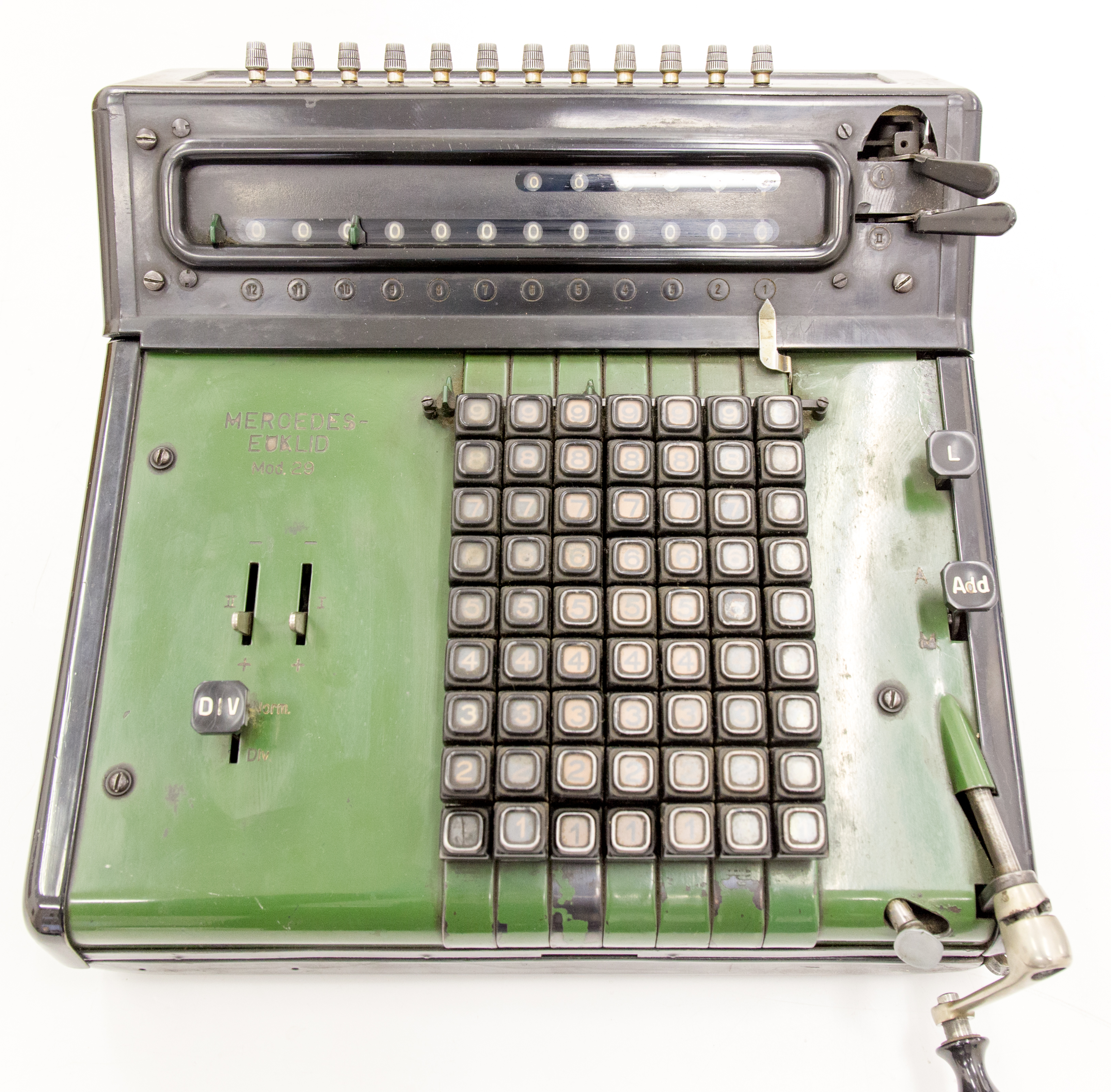 Rechenmaschine Mercedes Euklid, Mod. 29 Indetifikations-Nr.: I (46 R) 640/1988 Datierung: 1934-1952 Herstellungsort: Deutschland; Gebrauchsort: Zittau und Dresden Körperschaft: Mercedes Büromaschinenwerke, Hersteller Höhe x Breite x Tiefe: 16,5 x 30 x 33 cm Ausgabe: Metall Zustand: 1. unbedenklich / gut Beschreibung: Metallgehäuse, schwarz bzw. dunkelgrün, auf der Rückseite Firmenzeichen, schwarz auf silbernem Grund, „M W“, sowie gelbes Schild mit rotem Rand, „VEB (B) Baukombinat Dresden, Ins.-Nr. 10/0285“ sowie schwarzes Kunststoffschild, „VEB Bau (K) Zittau 1871“.Hersteller Merceds Büromaschinen-Werke A.-G. Zella-Mehlis i. TH. Antrieb durch Handkurbel, automatische Division, Einhandbedienung für Multiplikation, Momentlöschung, durchgehende Zehnerübertragung im Umdrehungszählwerk und Resultatwerk bis zur höchsten Stelle.